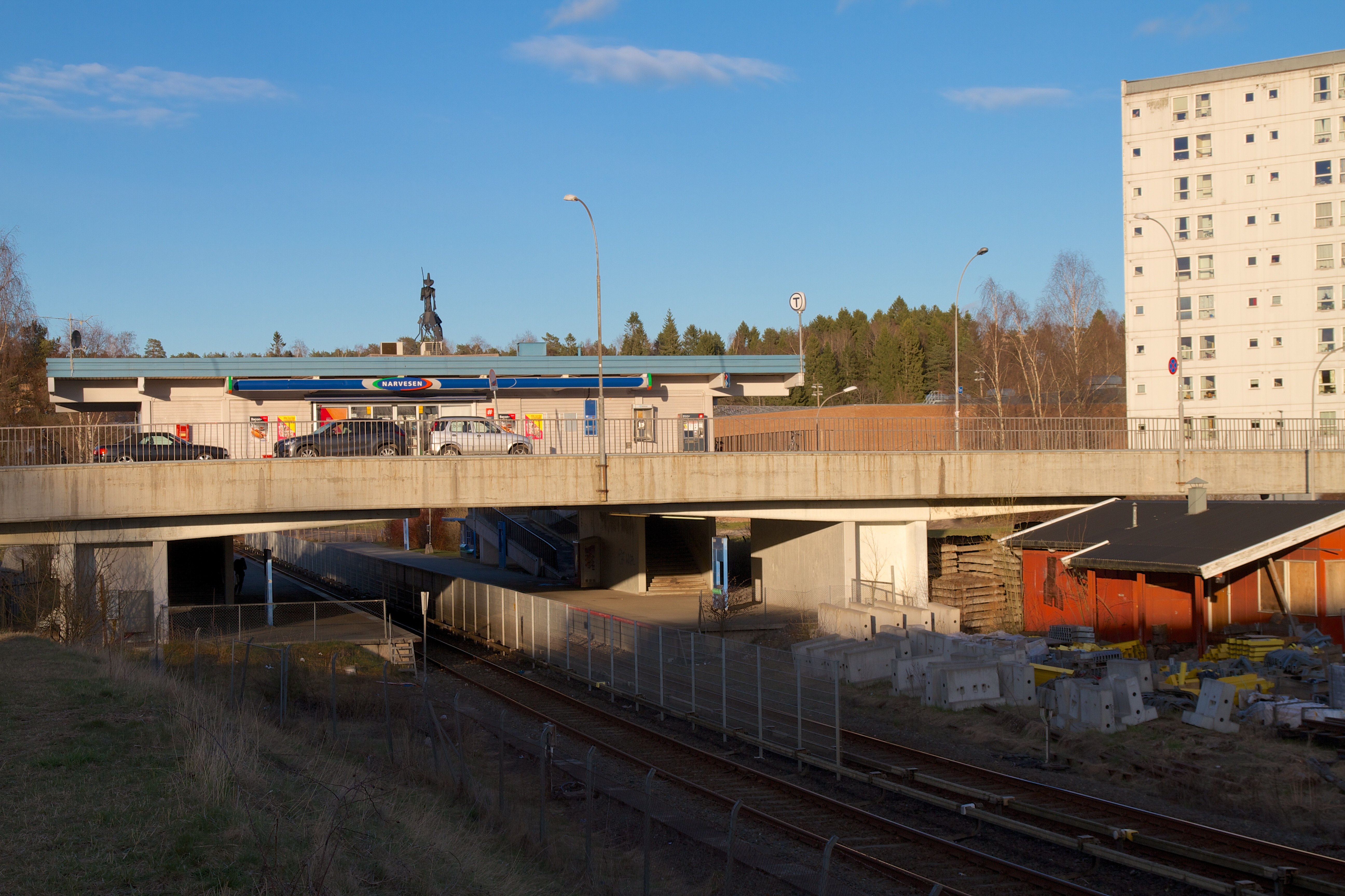 Bøler stasjon på Bøler i Oslo.